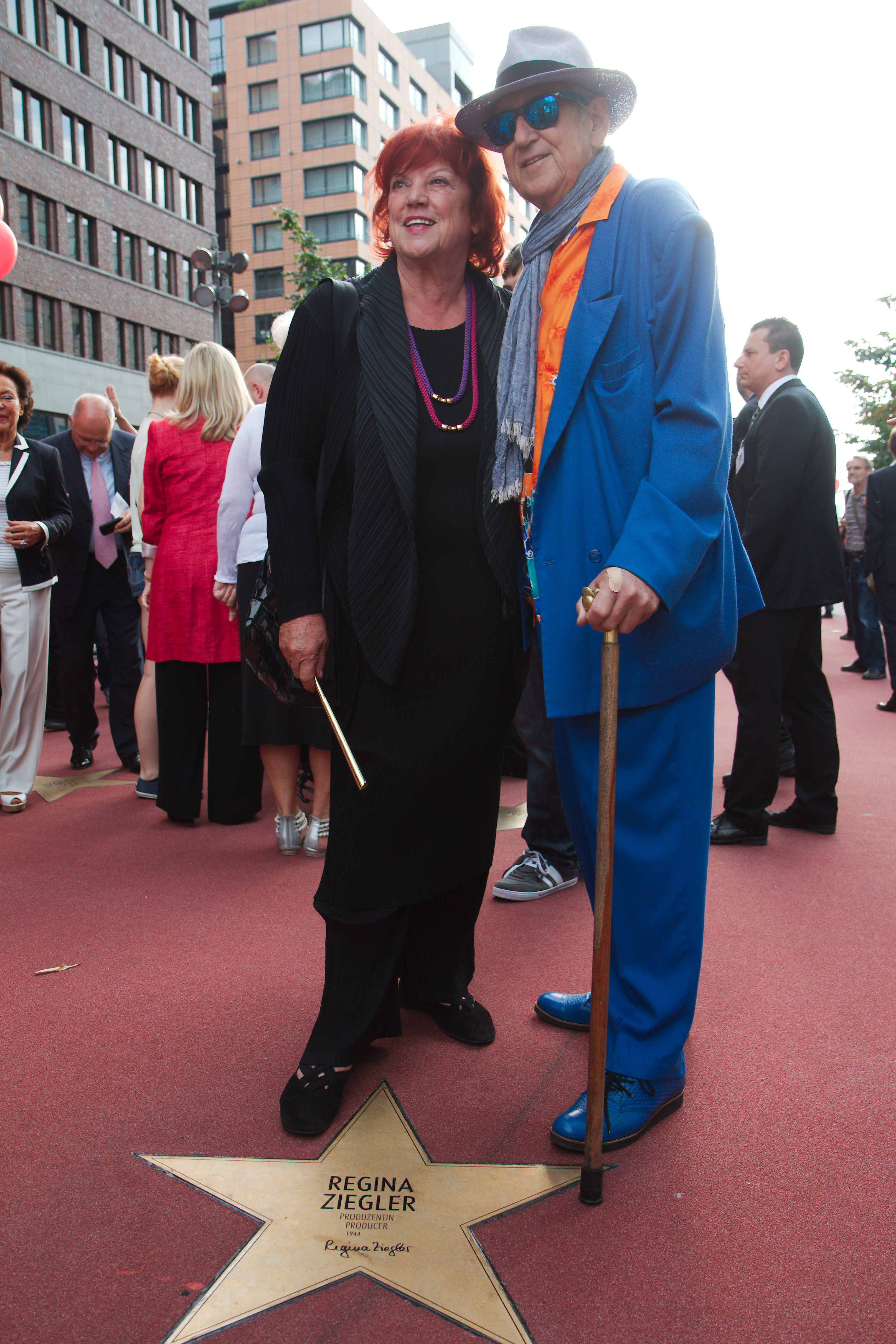 Ohne Bürgermeister